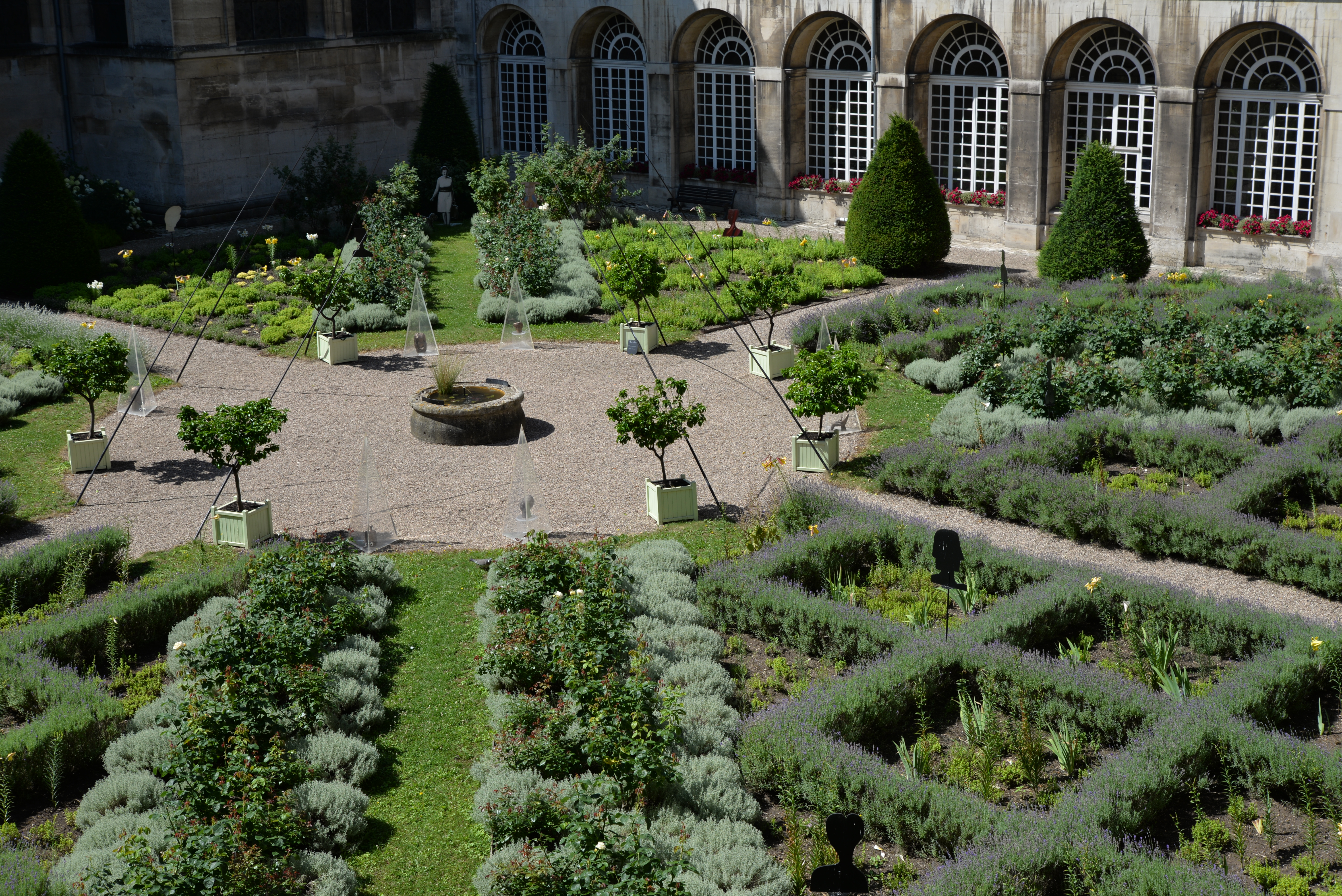 Cloitre de l'abbaye des Prémontrés de Pont-à-Mousson